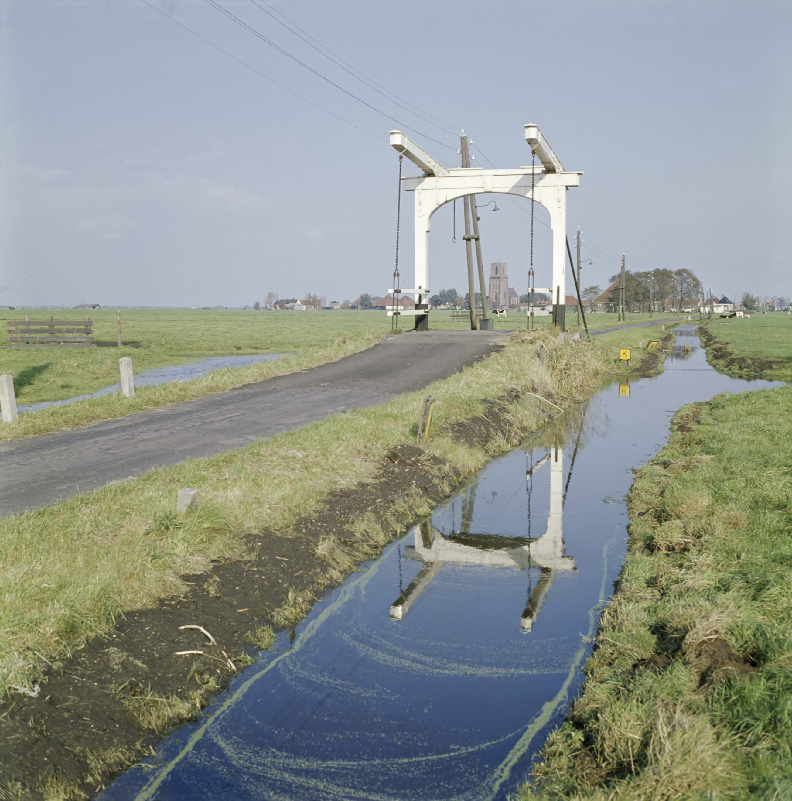 Reportage Nederland: Ophaalbrug/Wipbrug 379 bij Schellingwoude met in de verte Ransdorp; in de Liergouw (weg tussen de dorper 1960